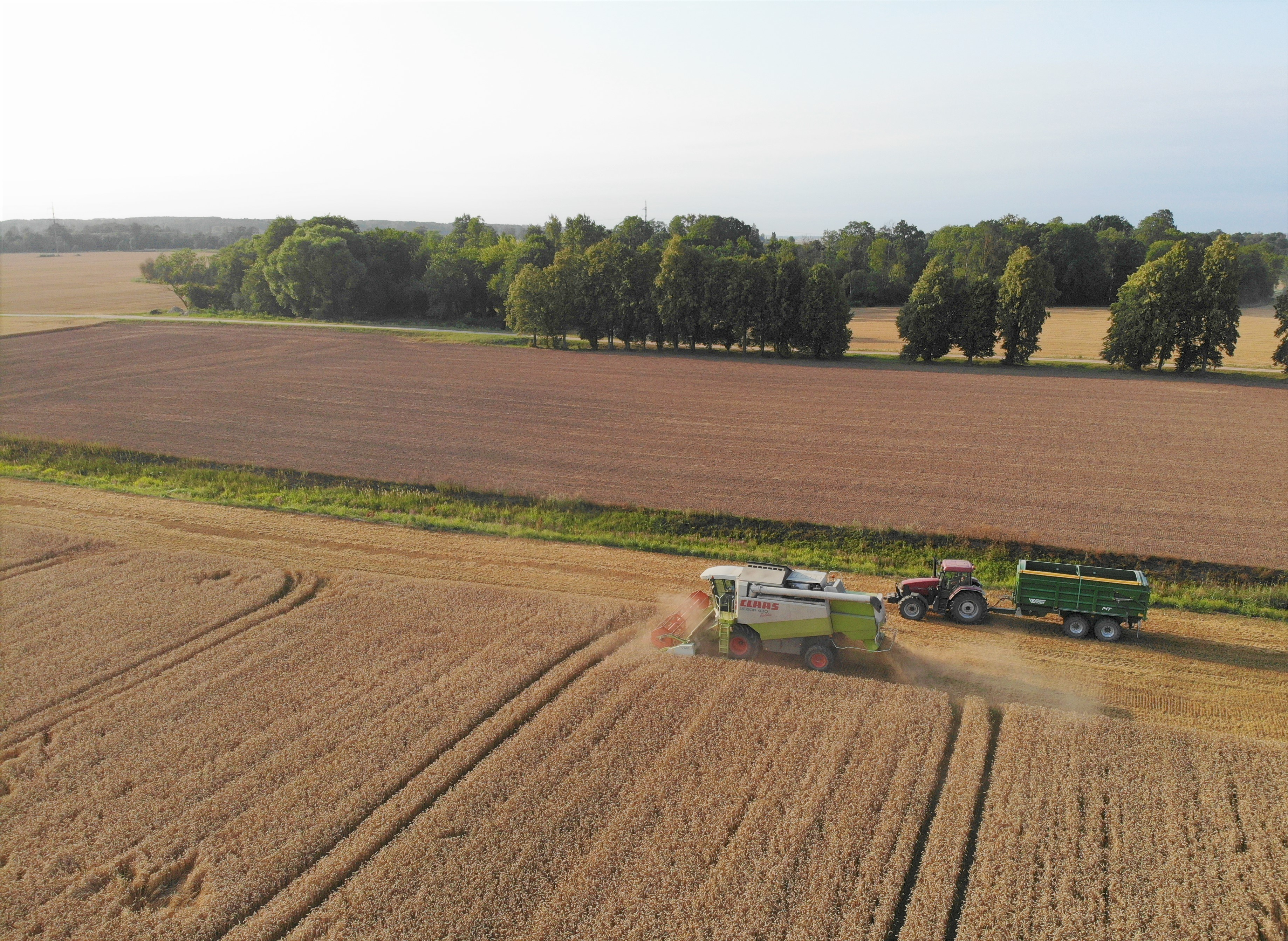 Graudu kulšana netālu no Dobeles, 2019. gada vasara.